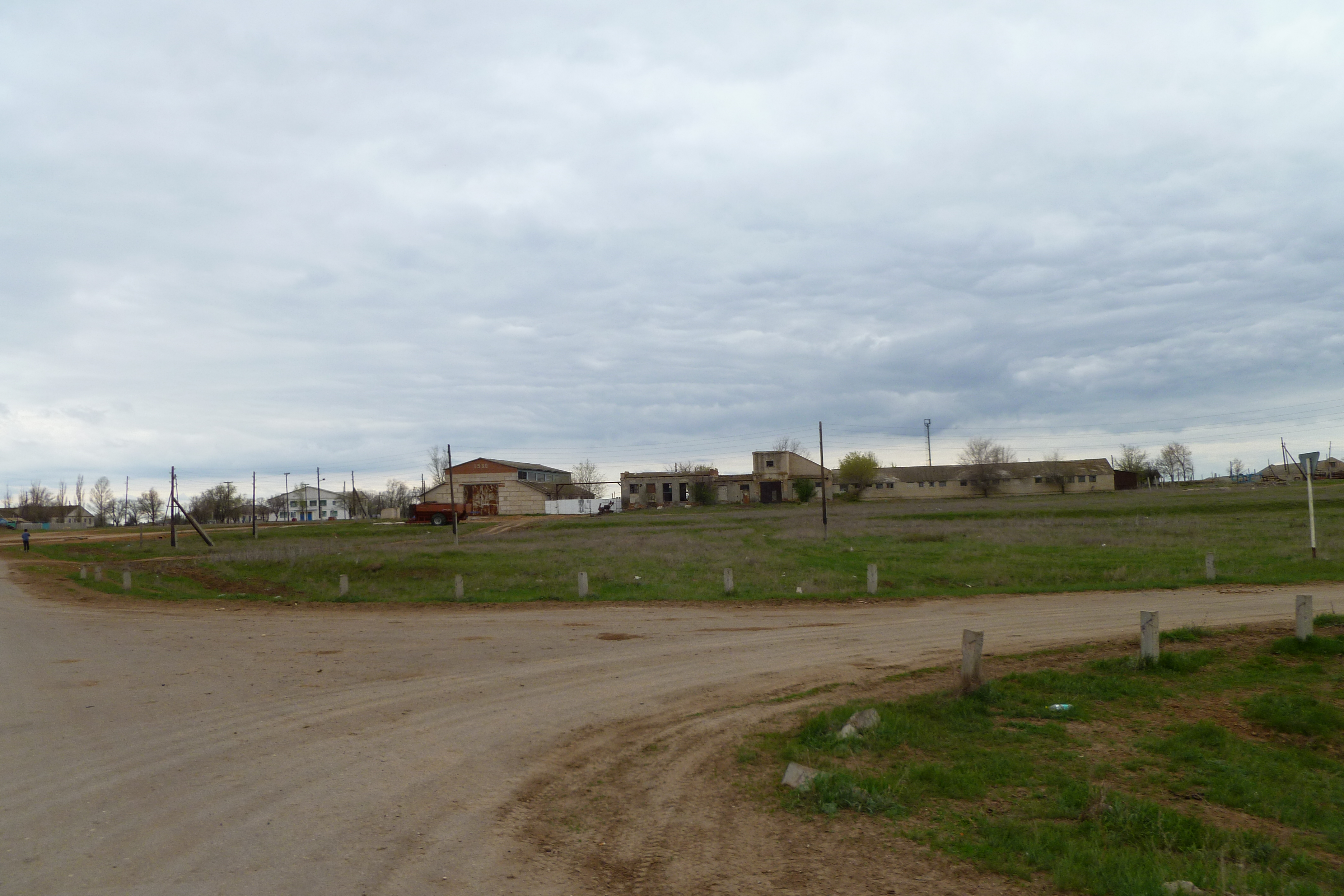 село в Волгоградской области, Октябрьском районе